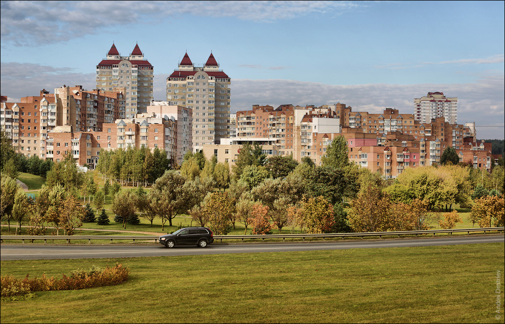 Замалёўкі Мінска